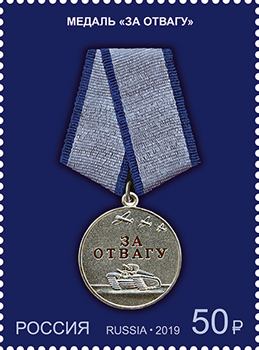 Медаль «За отвагу».